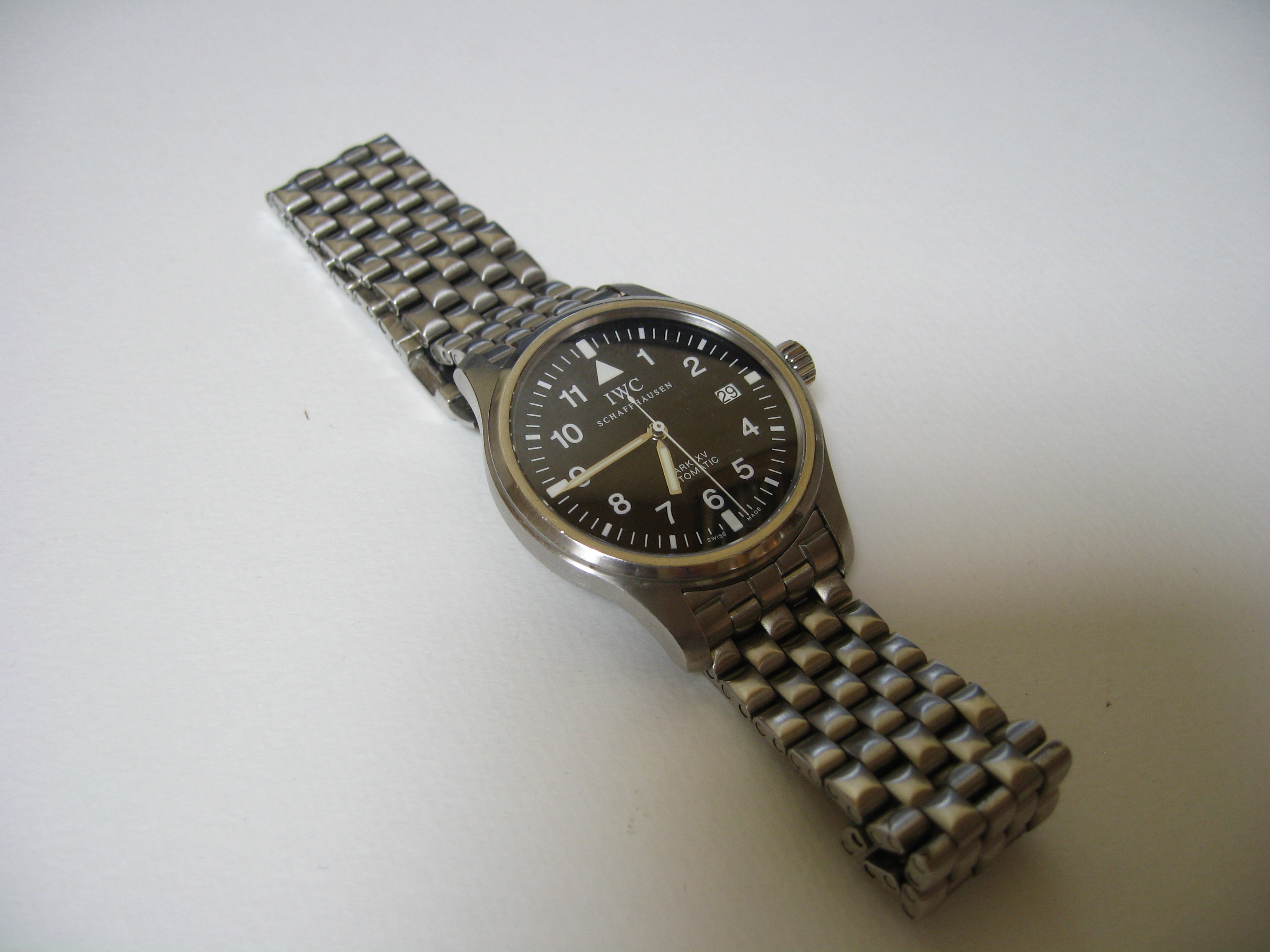 pilot's watch, IWC Mark IV